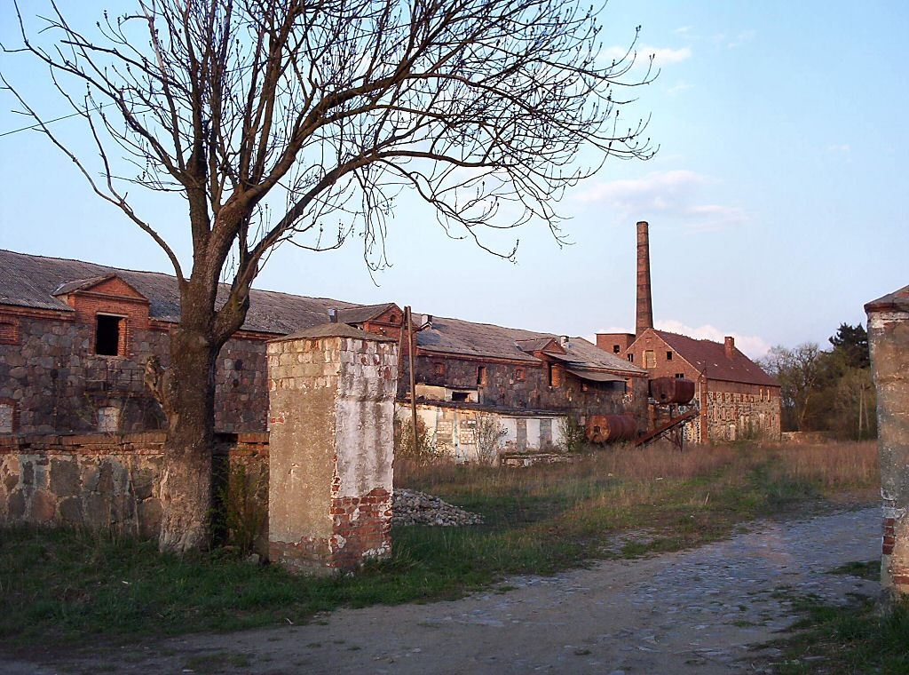 Chłopowo (powiat myśliborski) - folwark.jpg